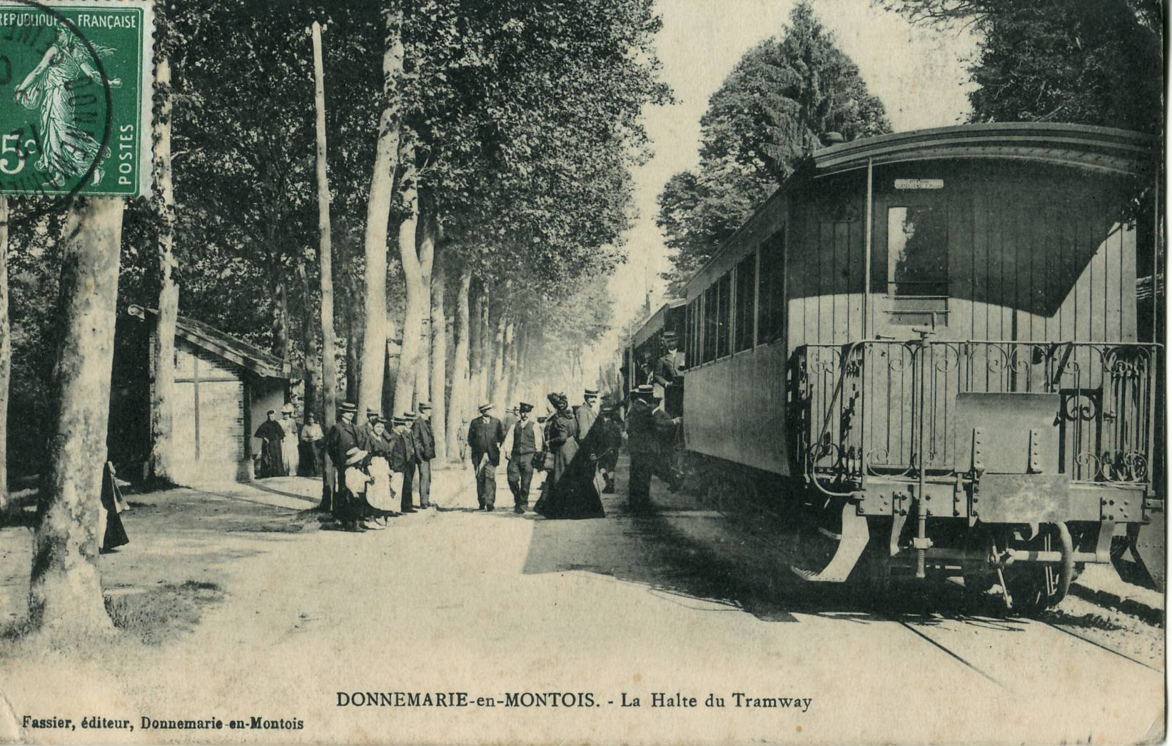 Carte postale ancienne éditée par Fassier à Donnemarie-en-Montois :DONNEMARIE-EN-MONTOIS - La Halte du Tramway